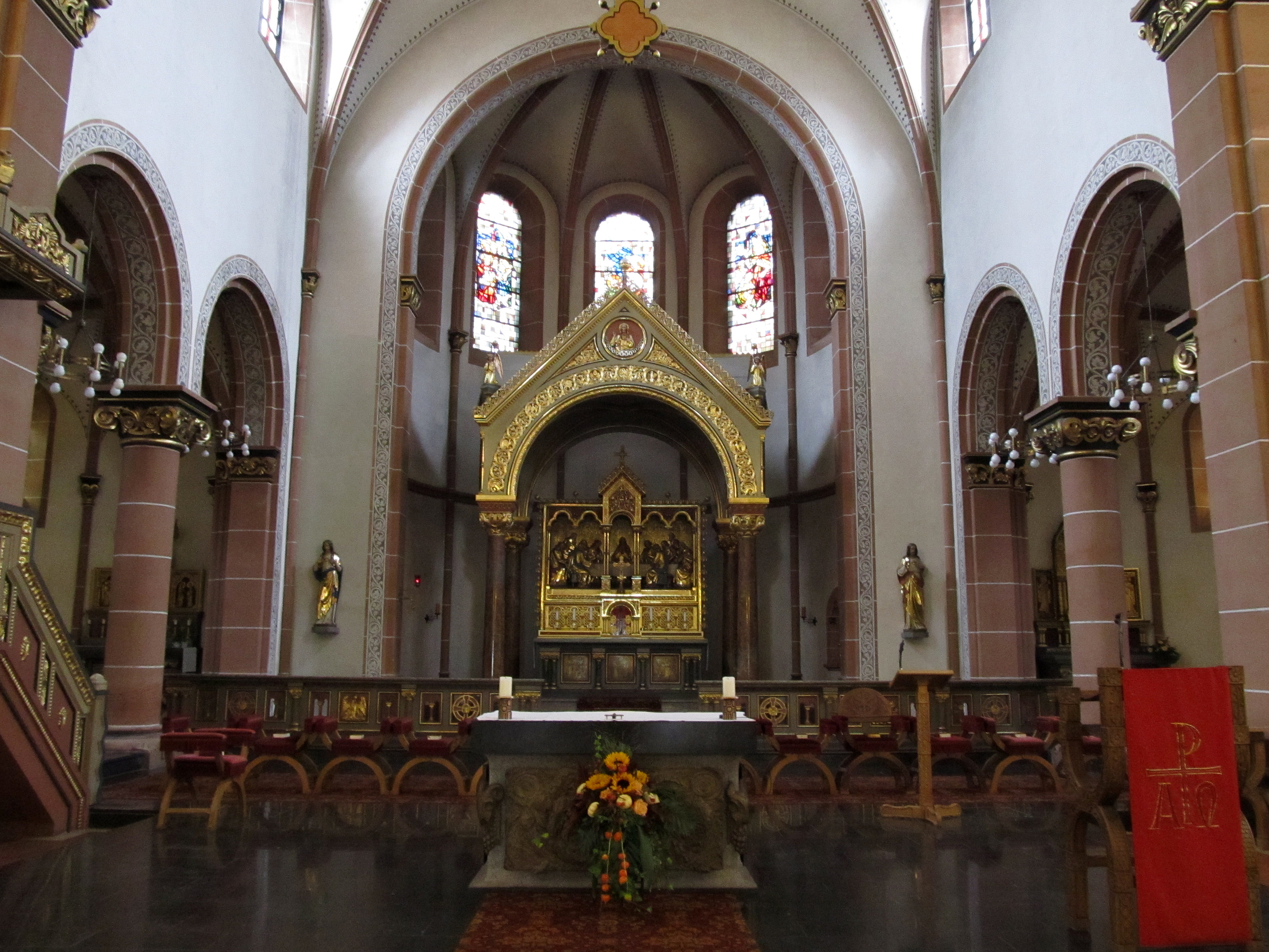 Altarraum der katholischen Pfarrkirche St. Sebastian in Püttlingen, Saarland